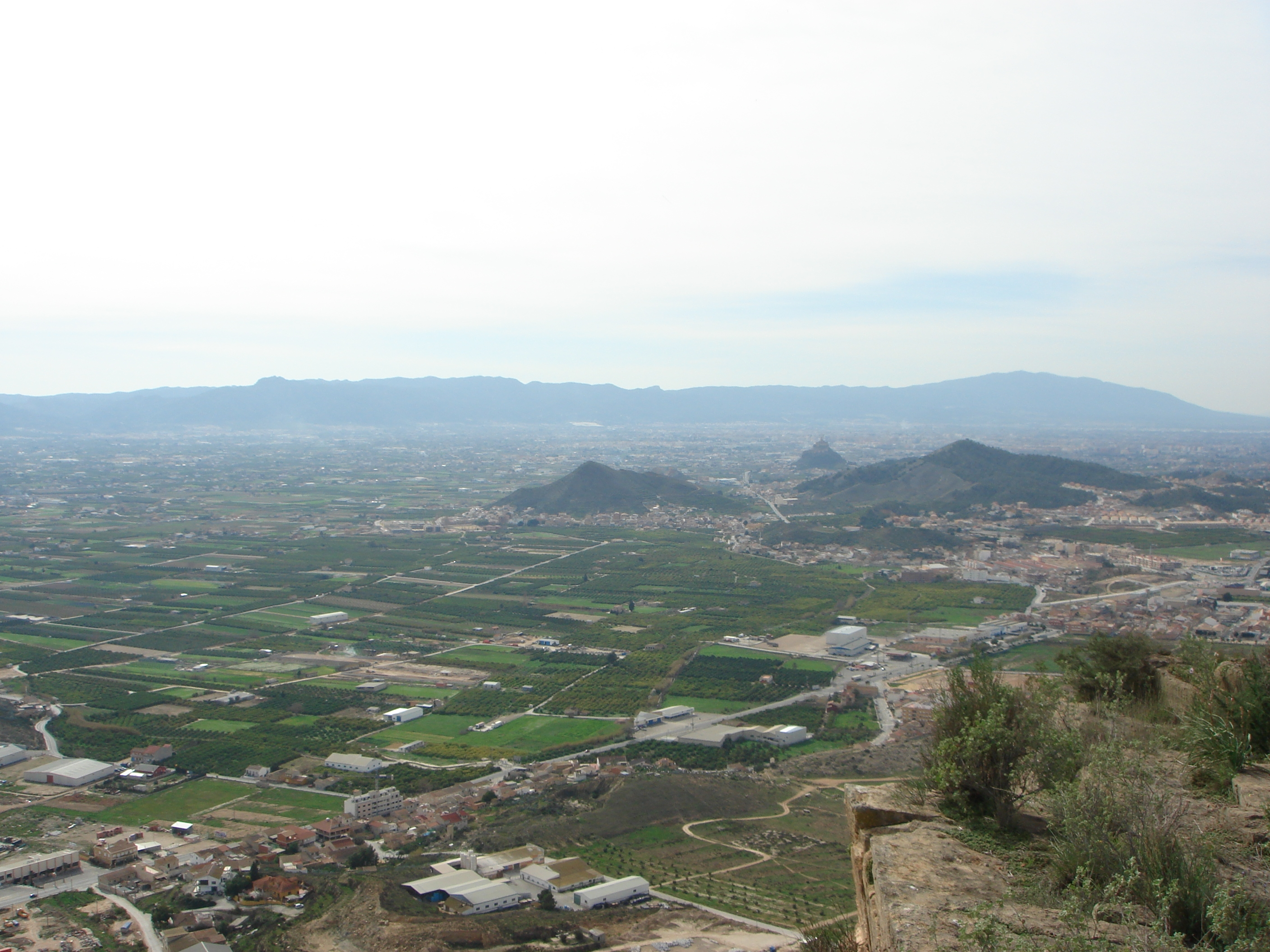 Vista de la Huerta de Murcia, una de las regiones de España que más destacan en la producción de hortalizas y frutas.